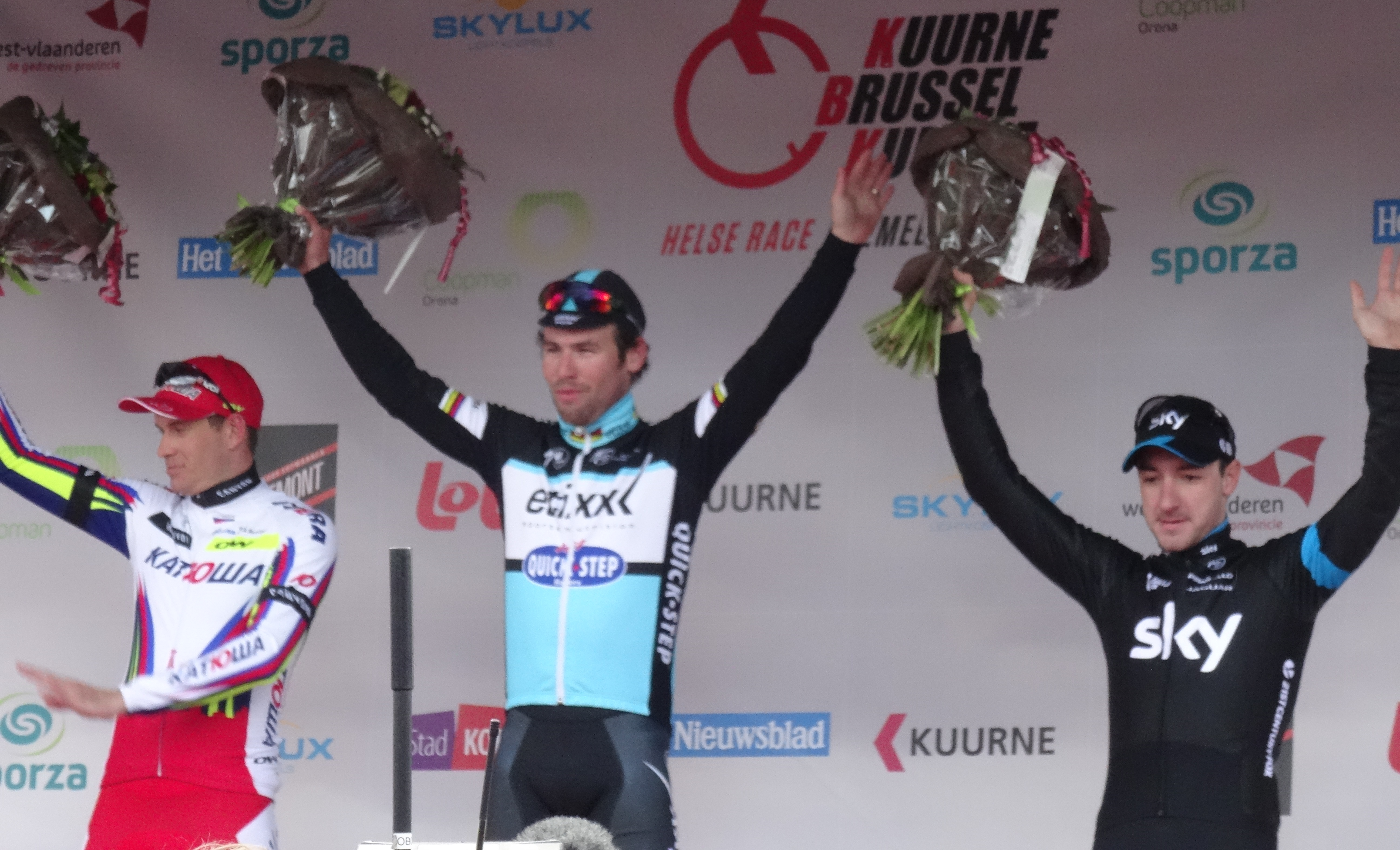 Reportage réalisé le dimanche 1er mars à l'occasion du départ et de l'arrivée de Kuurne-Bruxelles-Kuurne 2015 à Kuurne, Belgique.